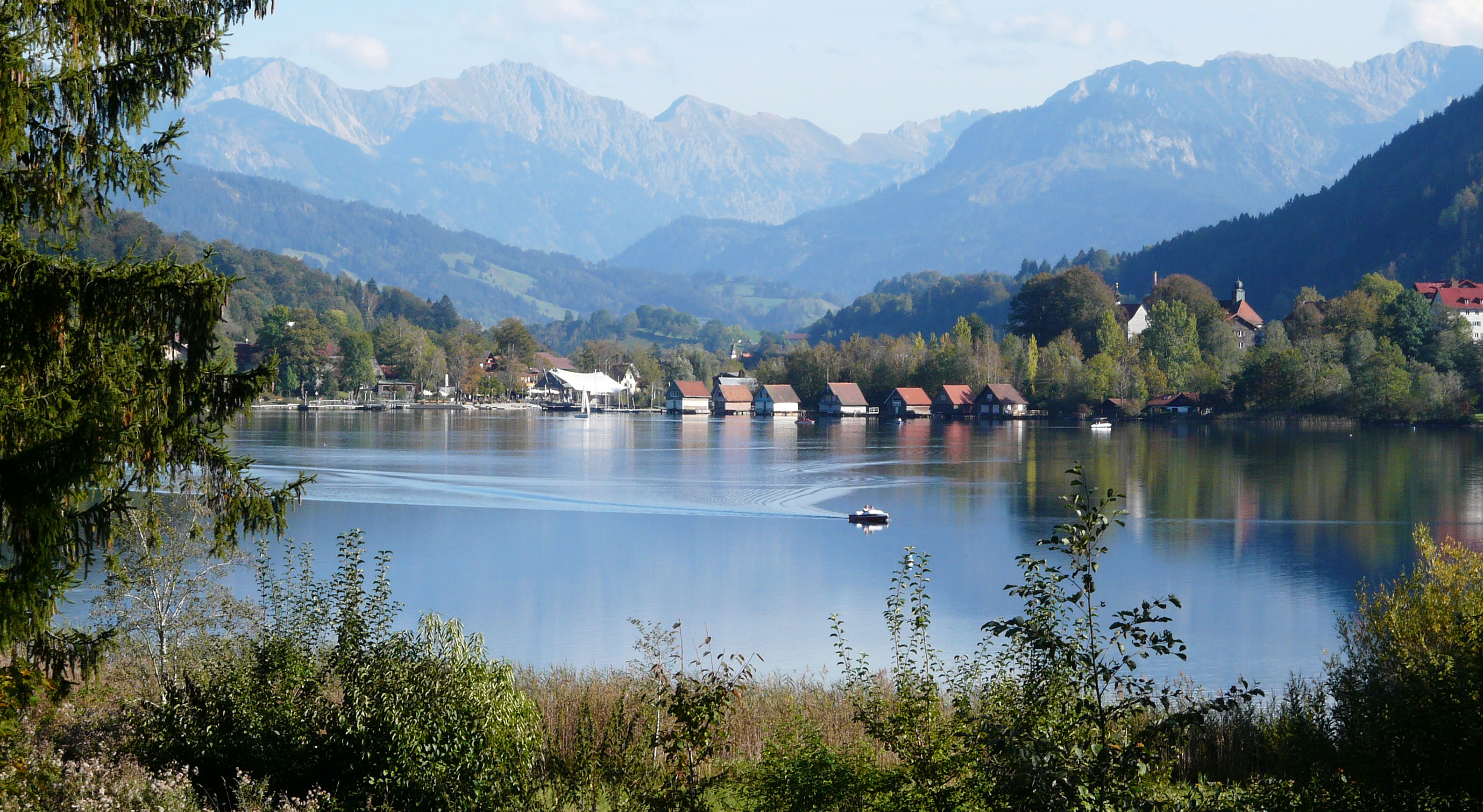 Großer Alpsee mit Bühl am Alpsee